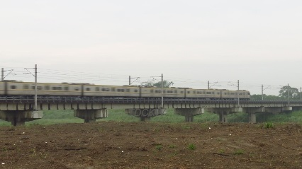 台鐵縱貫線八掌溪橋 was filmed by TDCKW on 20190416